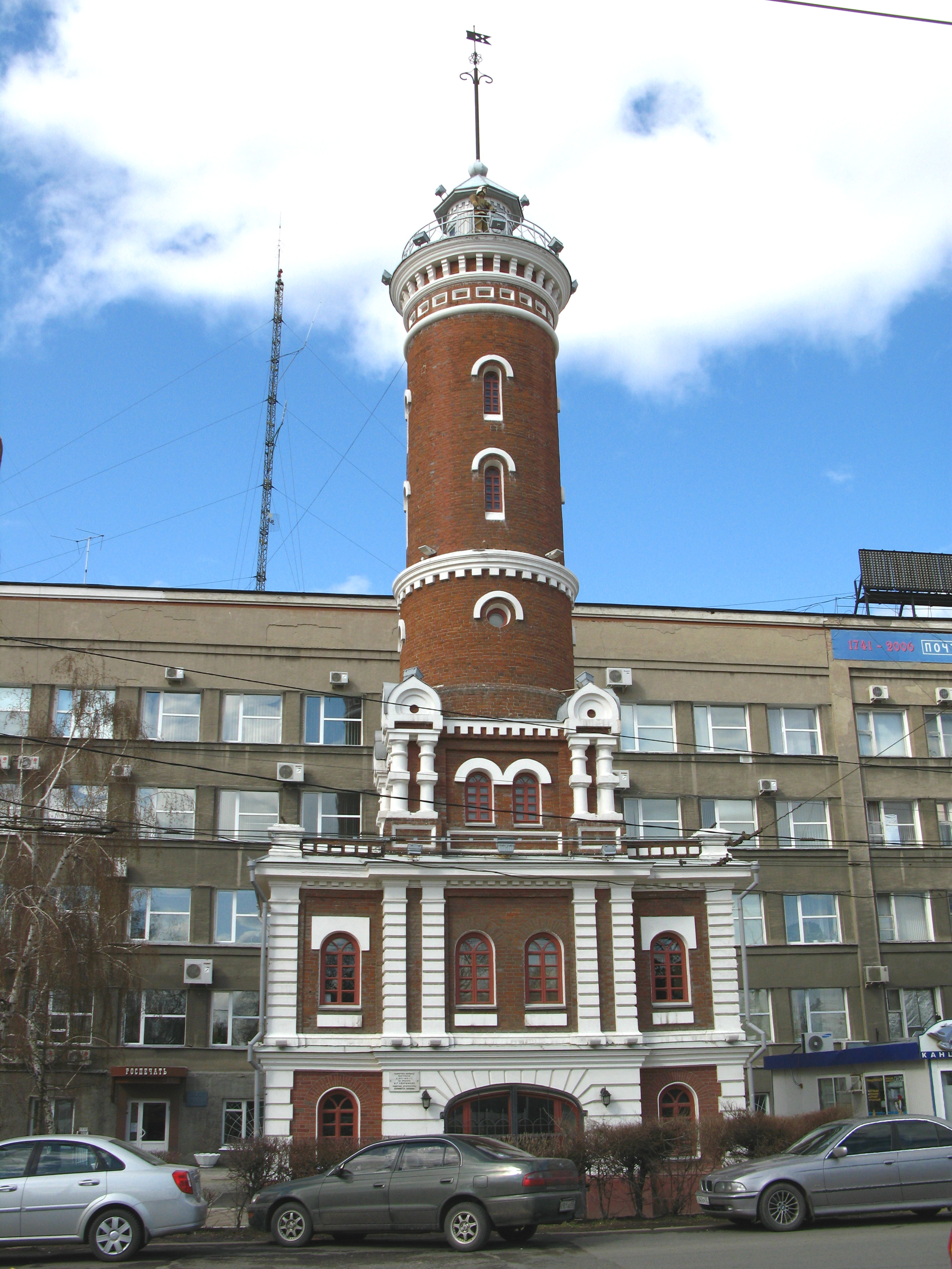 Пожарни торањ, симбол града Омск. Русија.